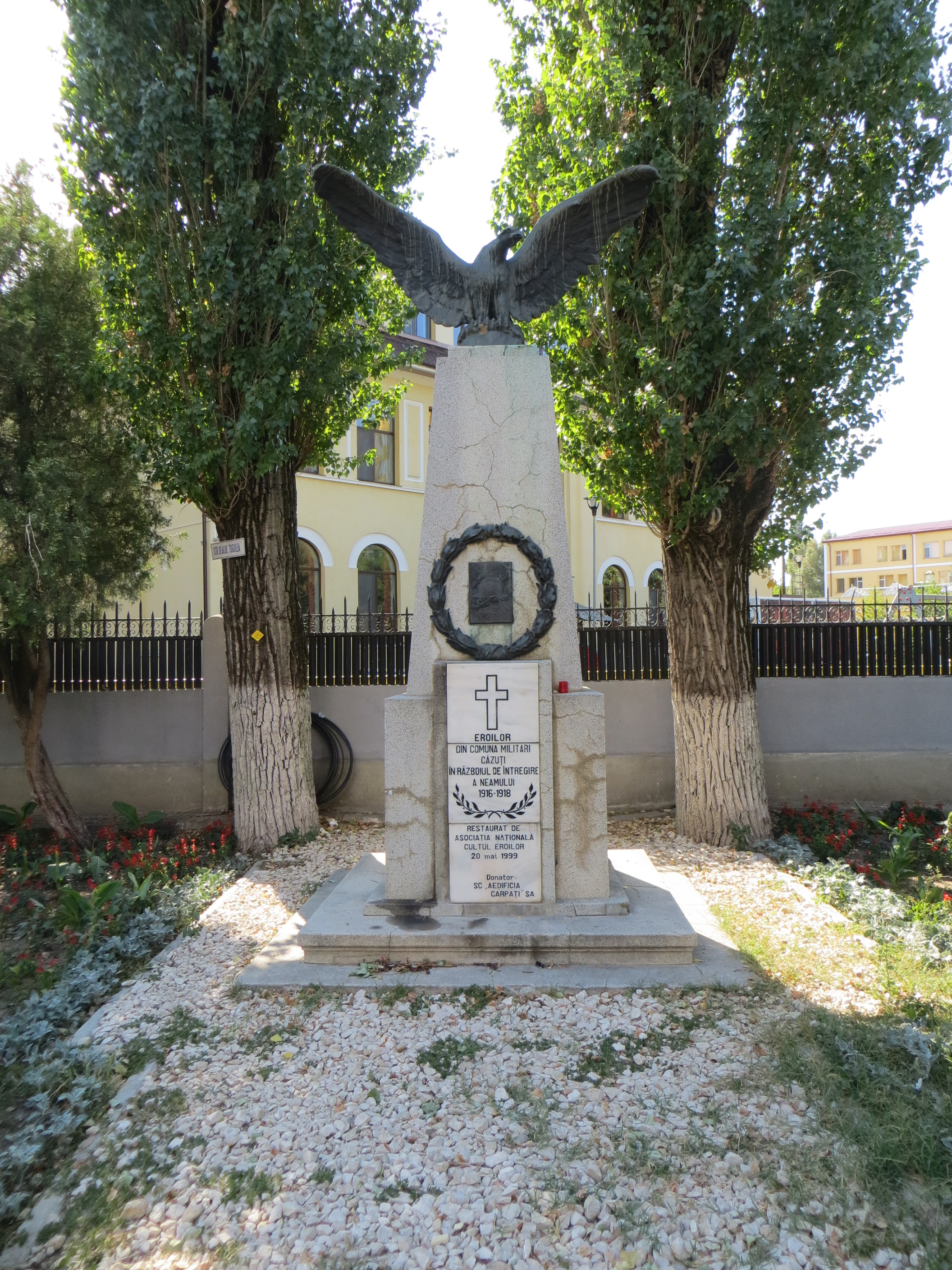 Monumentul eroilor căzuți în primul război mondial